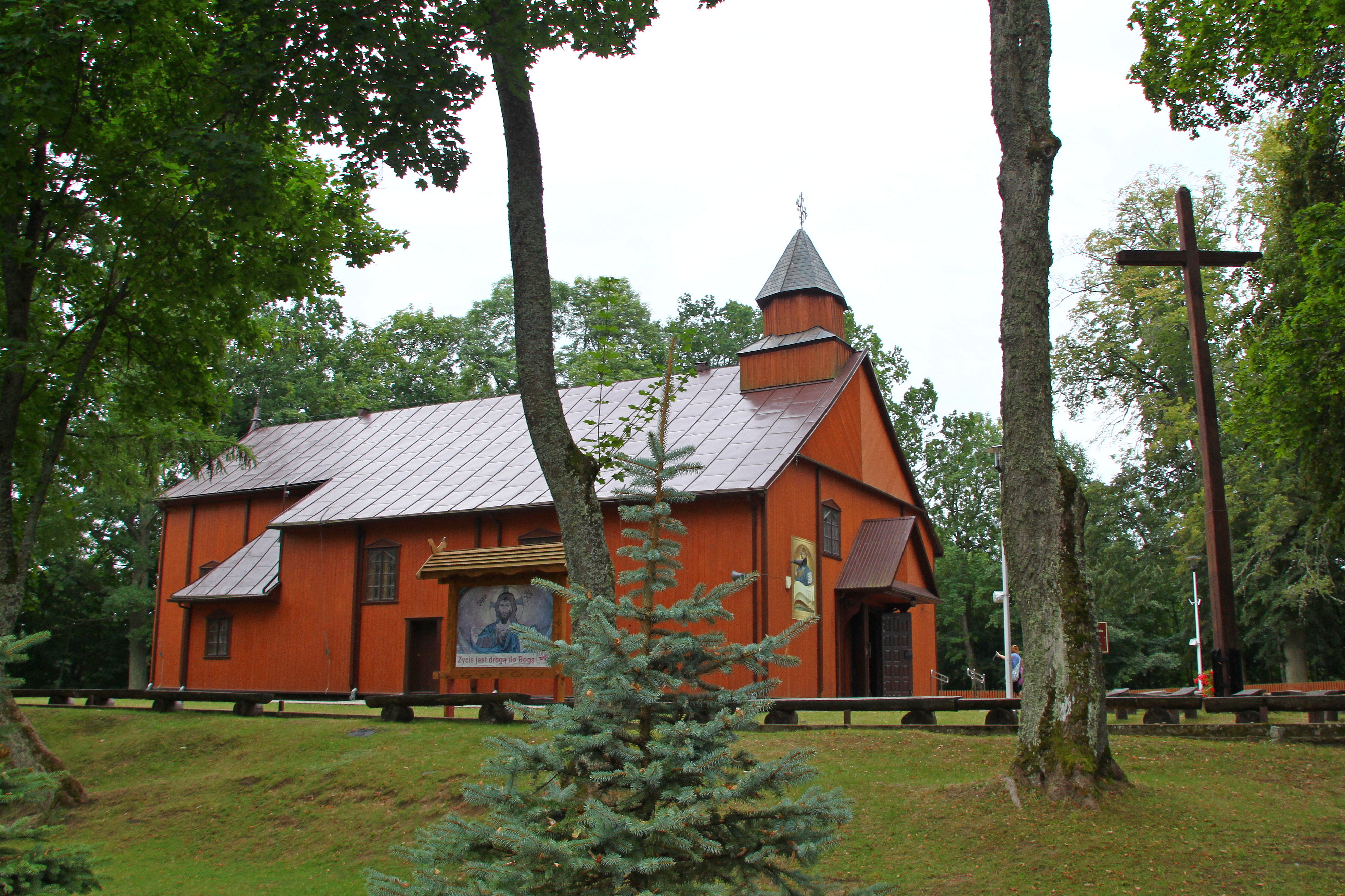 Augustów, kościół par. p.w. Matki Boskiej Szkaplerznej (dec. p.w. św. Tekli), 1836